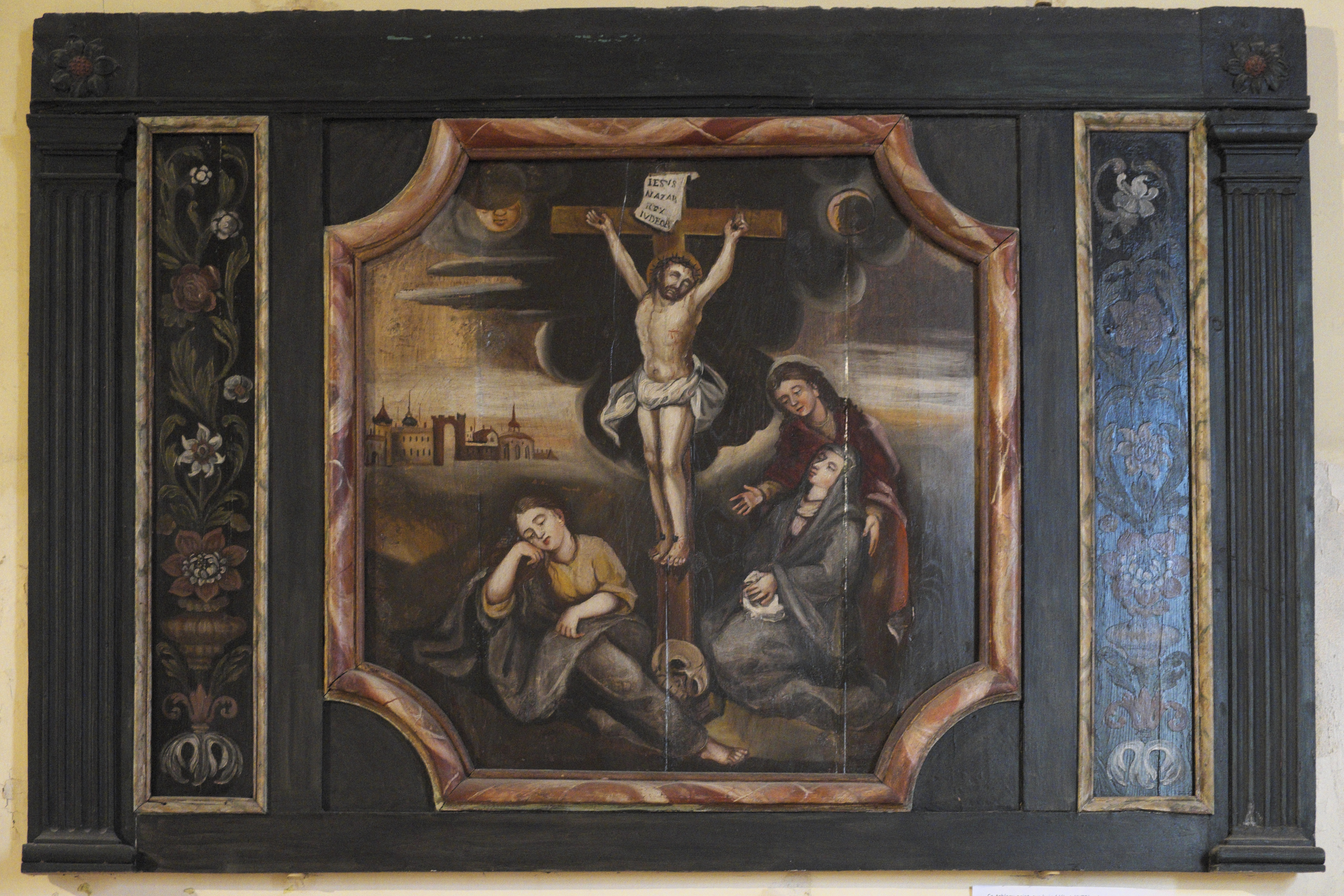 Kirche Saint-Romain in Curzon im Département Vendée (Pays de la Loire/Frankreich)